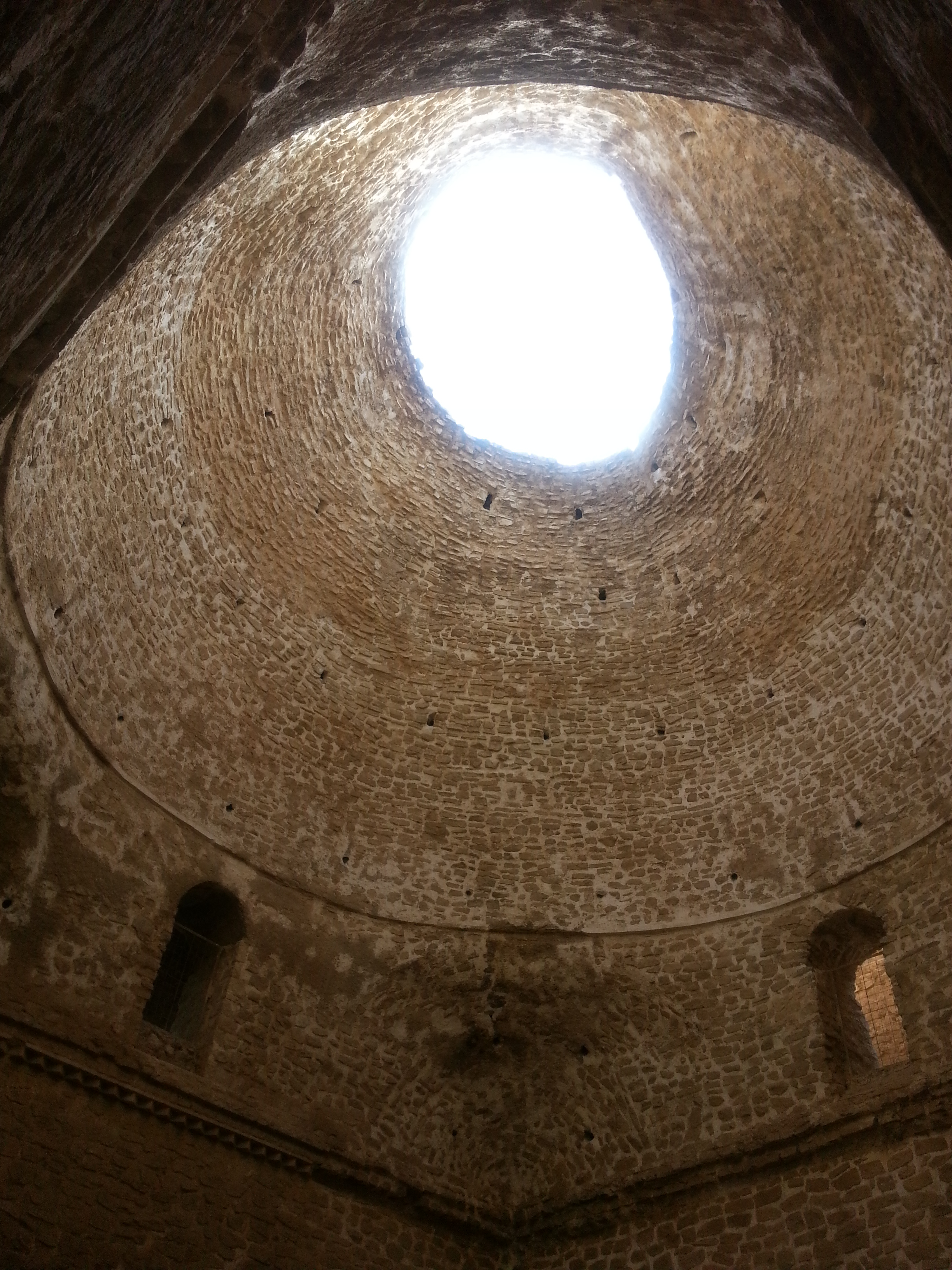 Ardeshir Palace, Firoozabad, Fars (کاخ اردشیر ساسانی، فیروزآباد، فارس)